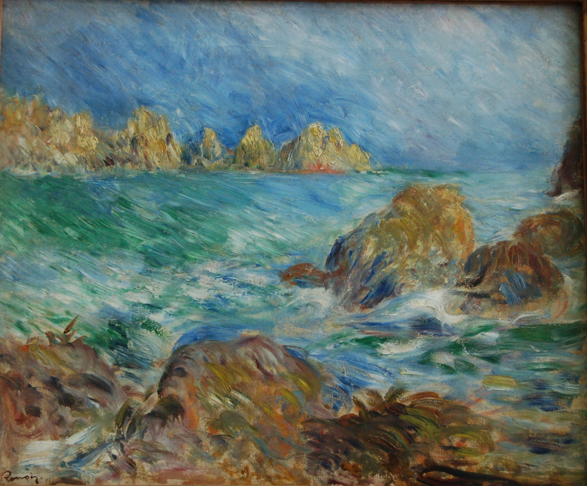 Musée d'Orsay, Paris, France